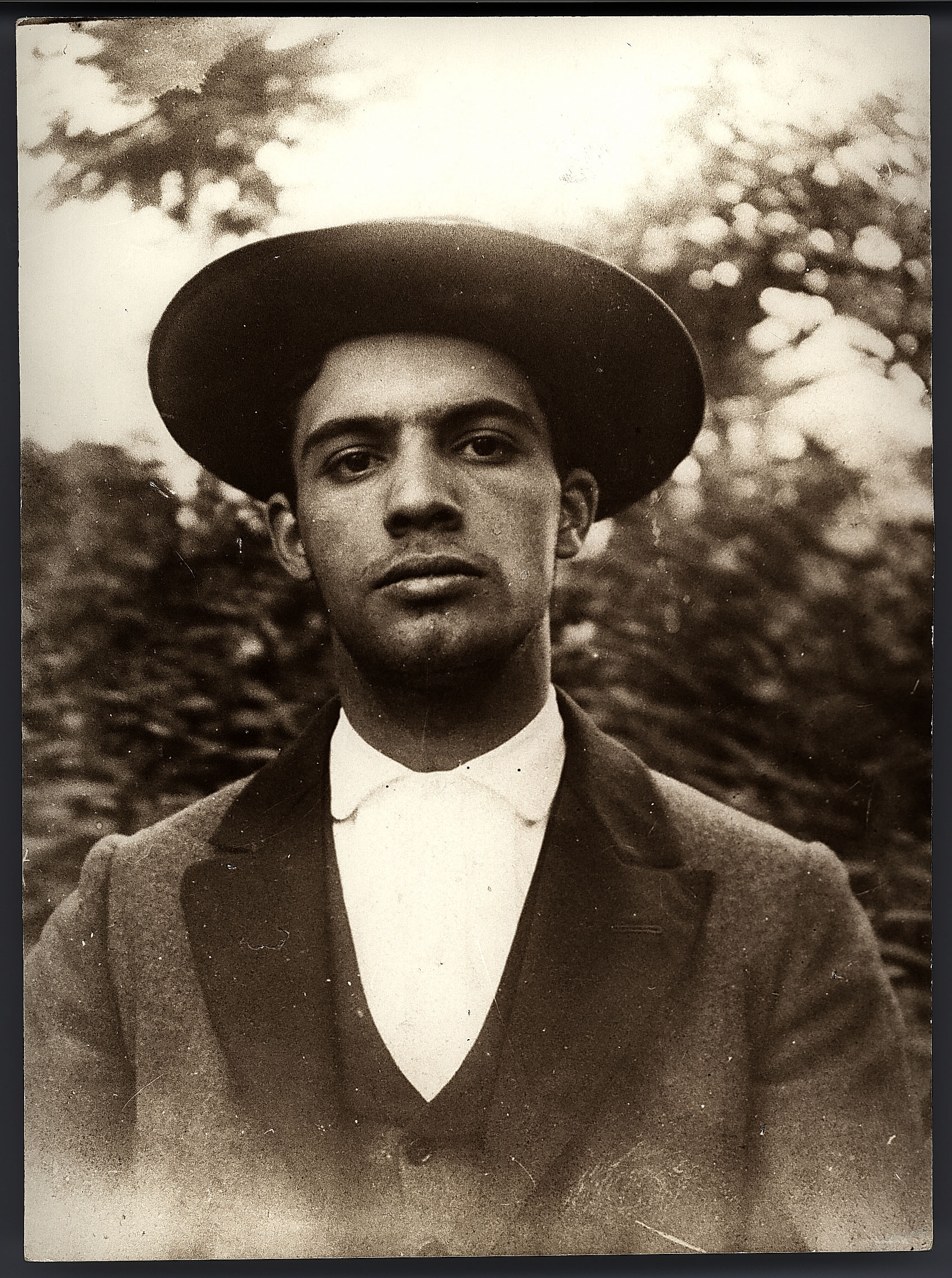 Amadeo de Souza Cardoso em Manhufe (Amarante, Portugal). Data aproximada de produção da fotografia original: 1908-1918 [ASC01-44 IC]